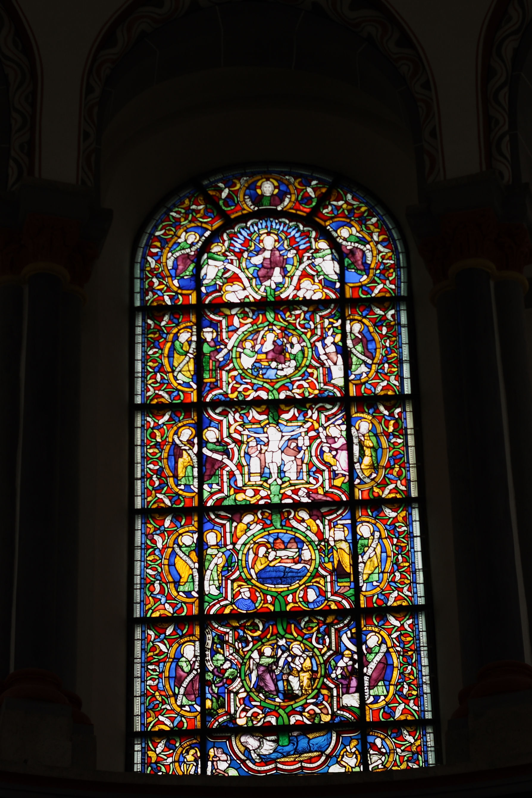 Bleiglasfenster (Jessefenster) in der Chorapsis der katholischen Pfarrkirche St. Kunibert in Köln, Darstellung: Jesse und das Leben Christi (siehe Werner Schäfke: Kölns romanische Kirchen: Architektur, Kunst, Geschichte, Emons, Köln 2004, S. 115ff., ISBN 3897053217